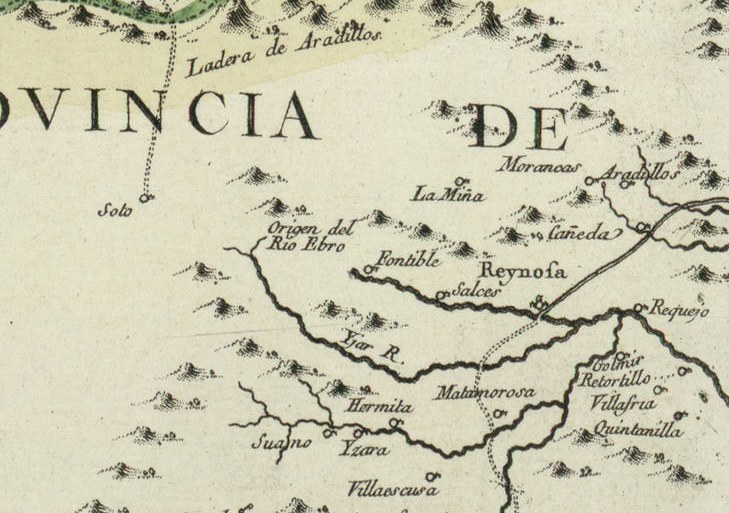 Mapa que comprehende el Partido del Baston de Laredo, y quatro Villas de la costa, con todos sus Valles, y la Provincia de Liebana, el corregimiento de Villarcayo, que encierra las merindades de Castilla la Vieja, separadas sus Juntas, Valles y agreg